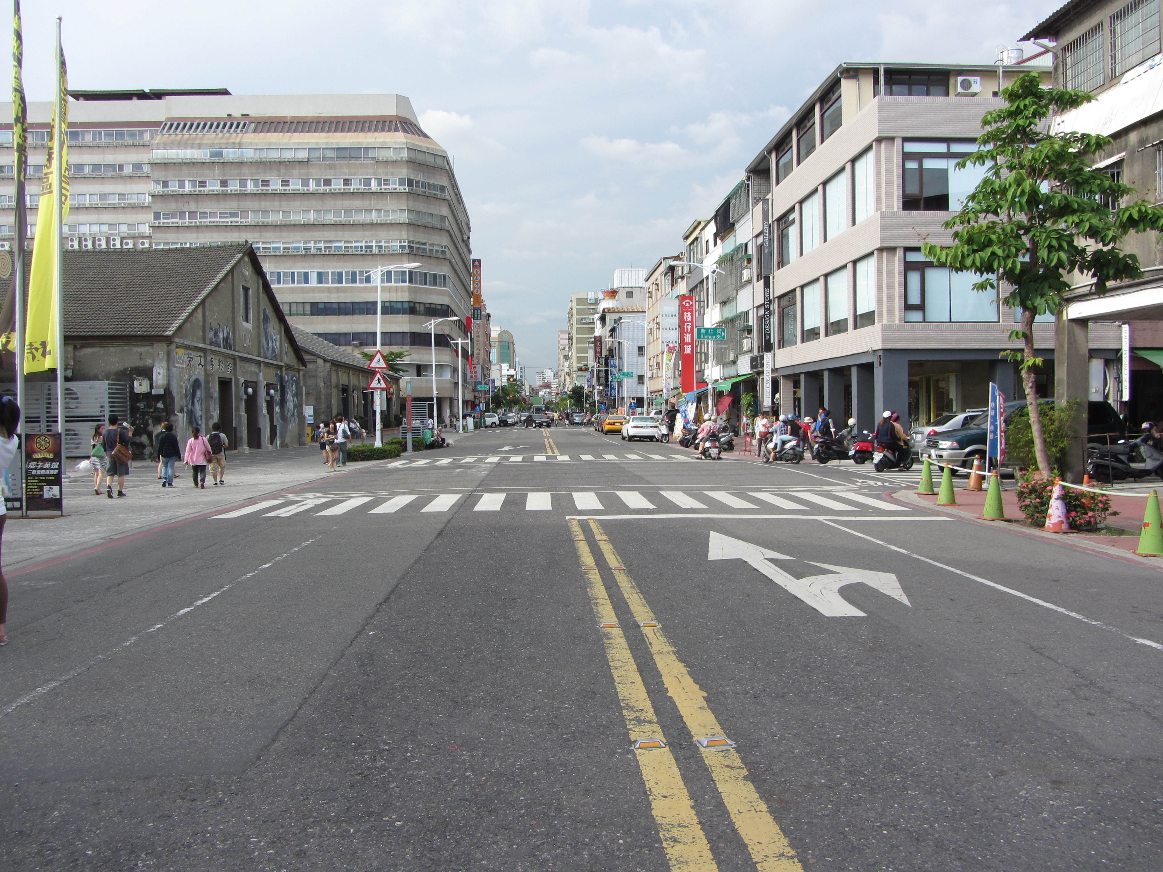 高雄市鹽埕區大勇路，駁二藝術特區前。